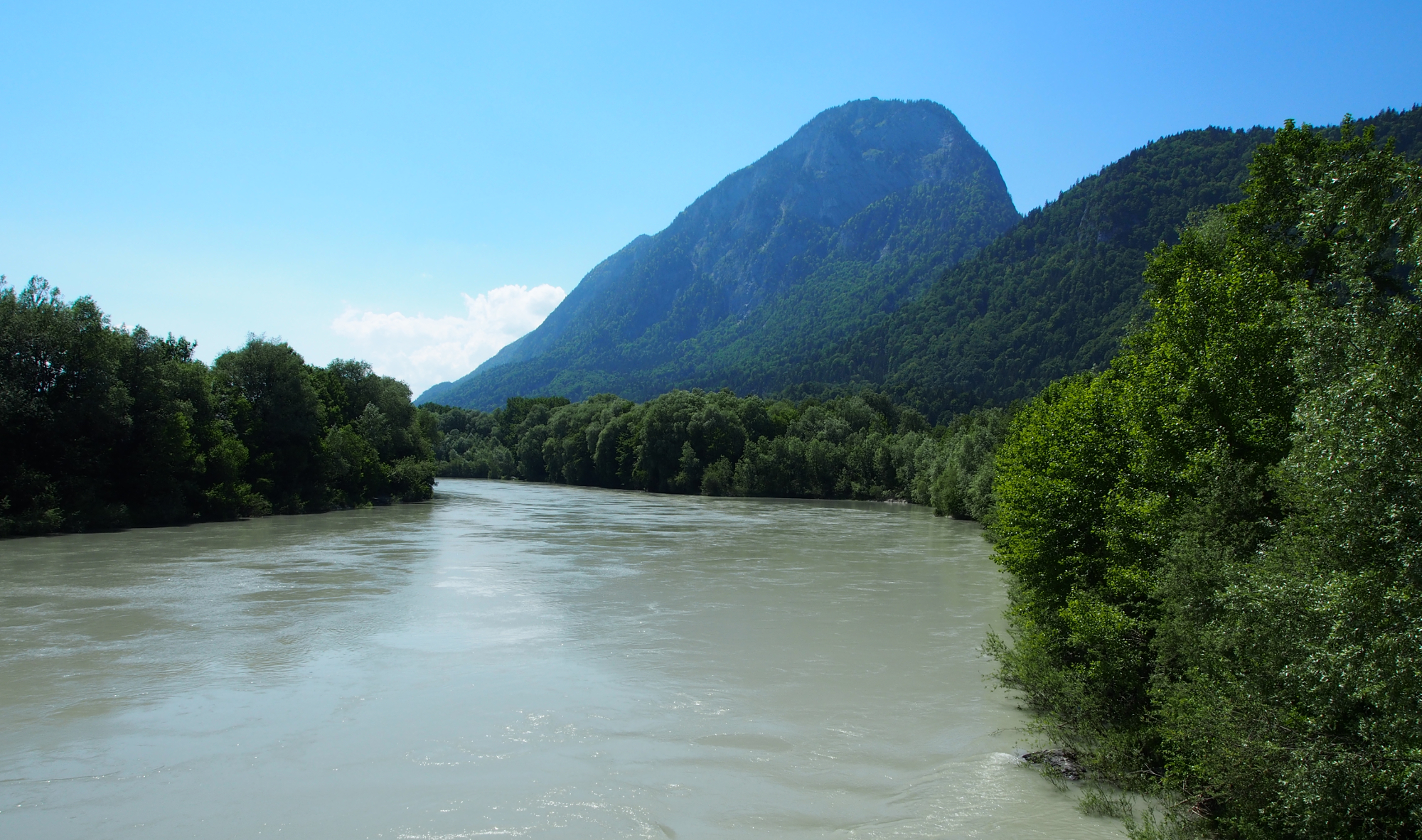 Kufsteiner und Langkampfener Innauen This media shows the nature reserve in the Tyrol with the ID 7029.